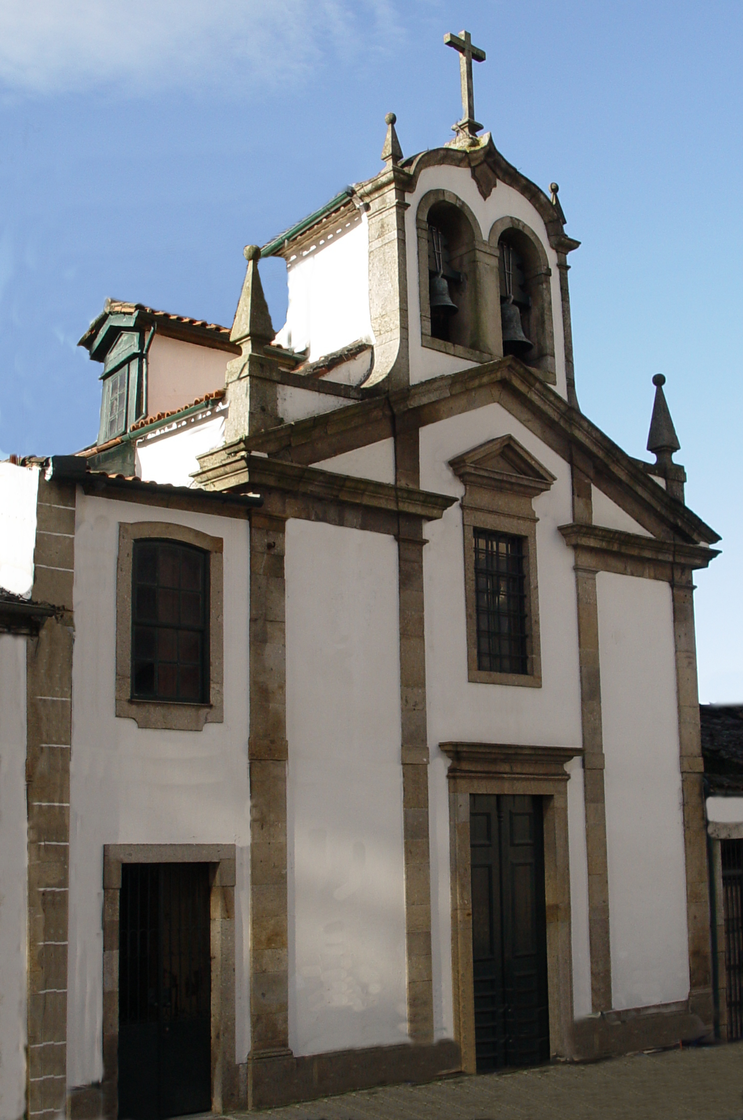 Capela de São Miguel-o-Anjo em Braga. Localizada na freguesia de Maximinos, muito próxima da estação, resulta da transferência de uma antiquíssima capela que existia junto à porta da Ajuda, no local de passagem das Carvalheiras para o Campo das Hortas. Desmantelada no início do século XIX, foi transferida para o atual local, juntamente com so retábulos da autoria de André Soares. Era o local onde tradicionalmente os arcebispos se paramentavam para fazer a sua entrada solene na Sé.